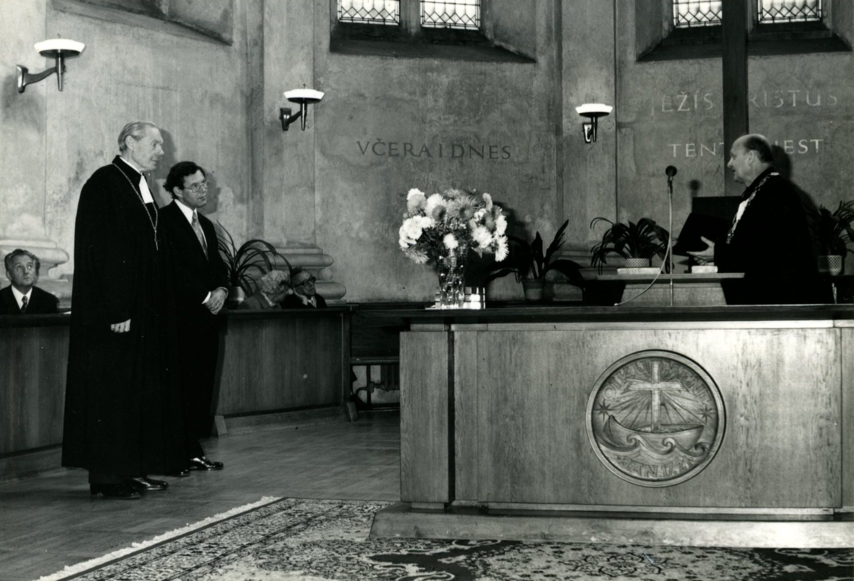 Synodní senior Miloslav Hájek děkuje biskupovi W. Heidlandovi a církevnímu radovi K-Ch. Eptingovi z Evangelické církve v Bádensku za pomoc při vytištění Evangelického zpěvníku, bohoslužby v kostele u Salvátora, 15.9.1979. Vzadu za hosty vedoucí tajemník Ústřední církevní kanceláře Jiří Otter.